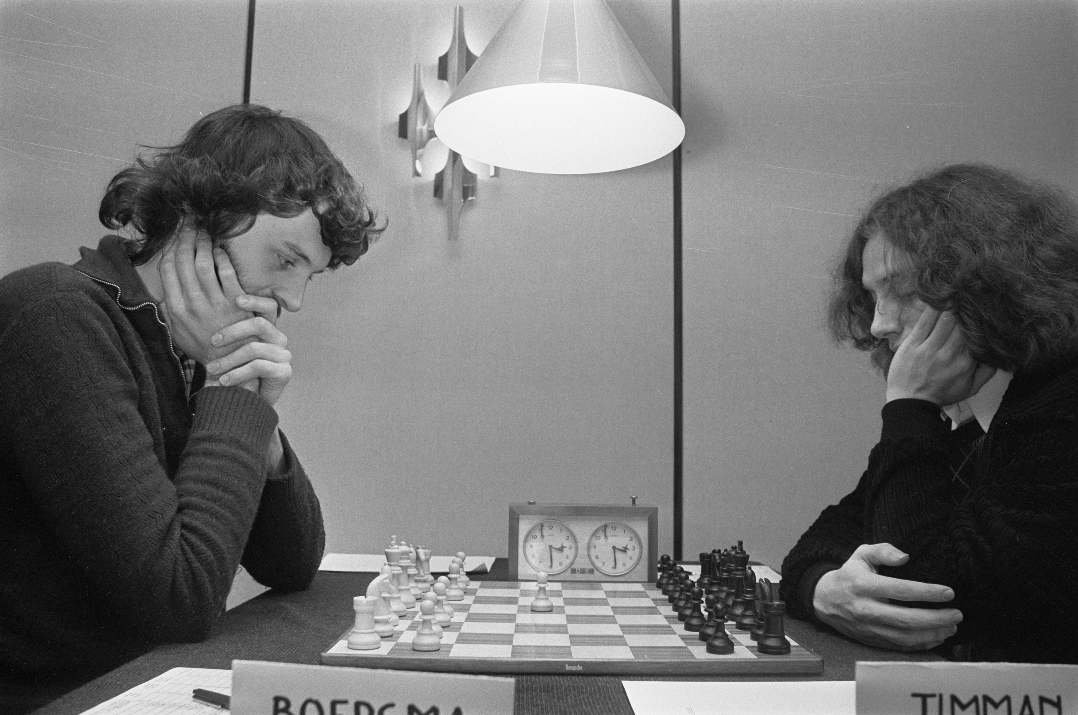 Collectie / Archief : Fotocollectie Anefo Reportage / Serie : De Nederlandse kampioenschappen schaken 1977 Beschrijving : Paul Boersma (l) aan het begin van zijn partij tegen Jan Timman Annotatie : randnummers negatiefstrook: nr. 9 Ree Datum : 20 april 1977 Locatie : Friesland, Leeuwarden Trefwoorden : schaken, sport, wedstrijden Persoonsnaam : Boersma, Paul, Timman, Jan Fotograaf : Bogaerts, Rob / Anefo Auteursrechthebbende : Nationaal Archief Materiaalsoort : Negatief (zwart/wit) Nummer archiefinventaris : bekijk toegang 2.24.01.05 Bestanddeelnummer : 929-1327